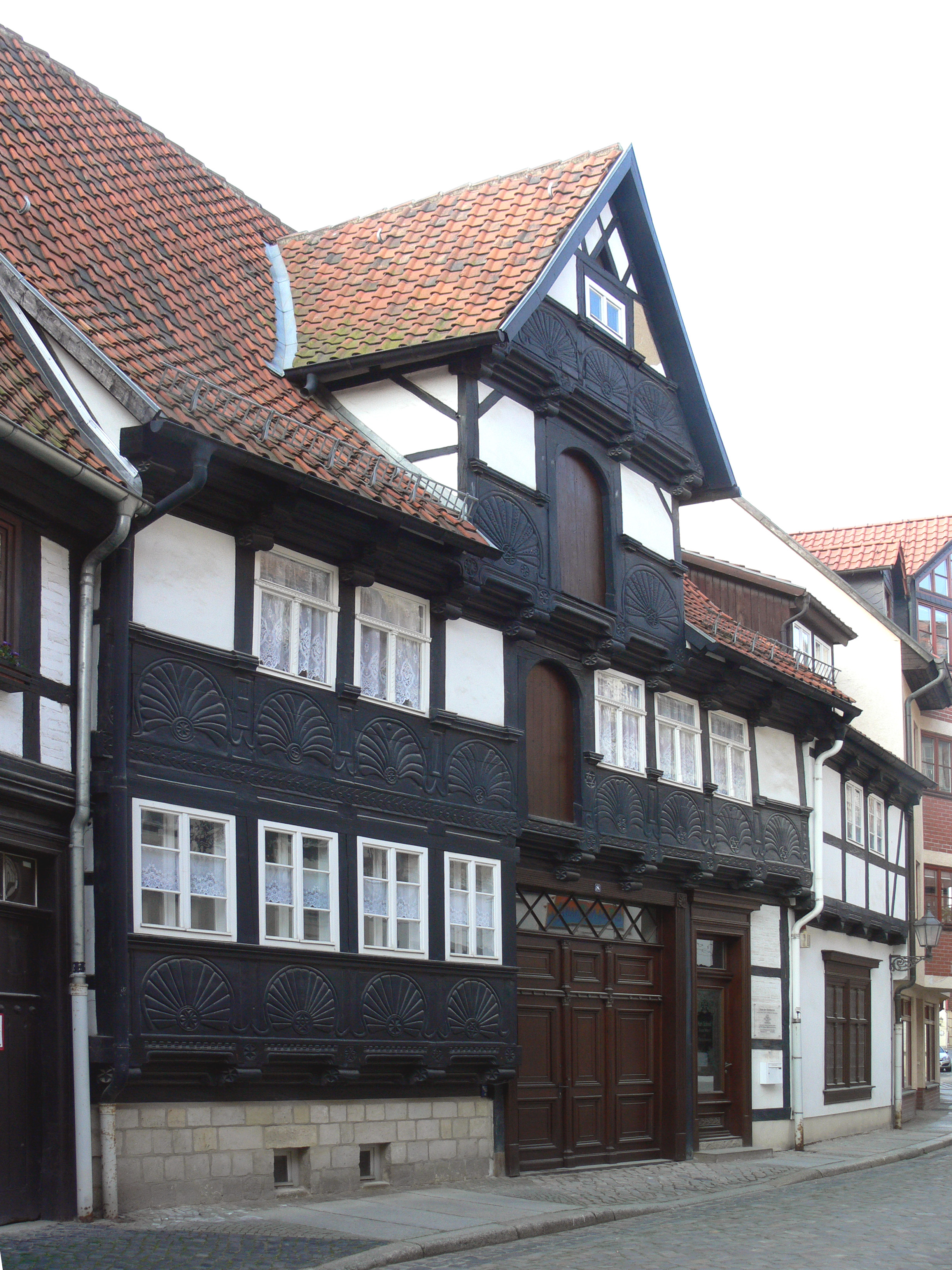 Hohe Straße 8 in Quedlinburg.